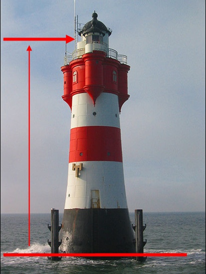 Feuerhöhe = Höhe der Lichtquelle über Meer